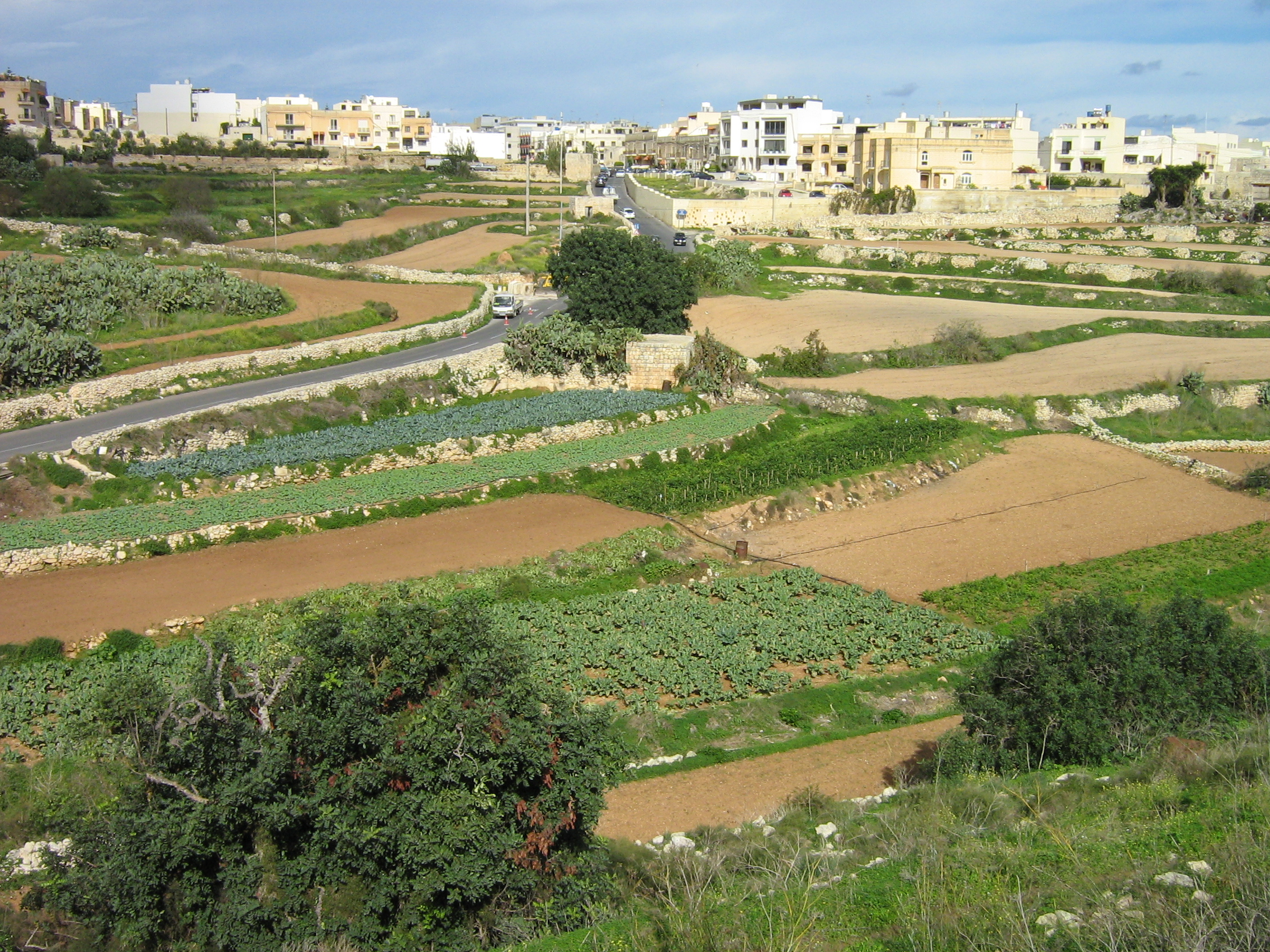 Земли на Мальте мало. Поля крошечные.